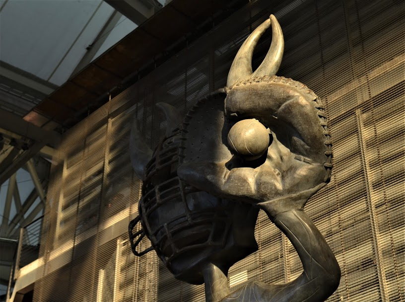 Pieza de arte elaborada por Sergio Hernández